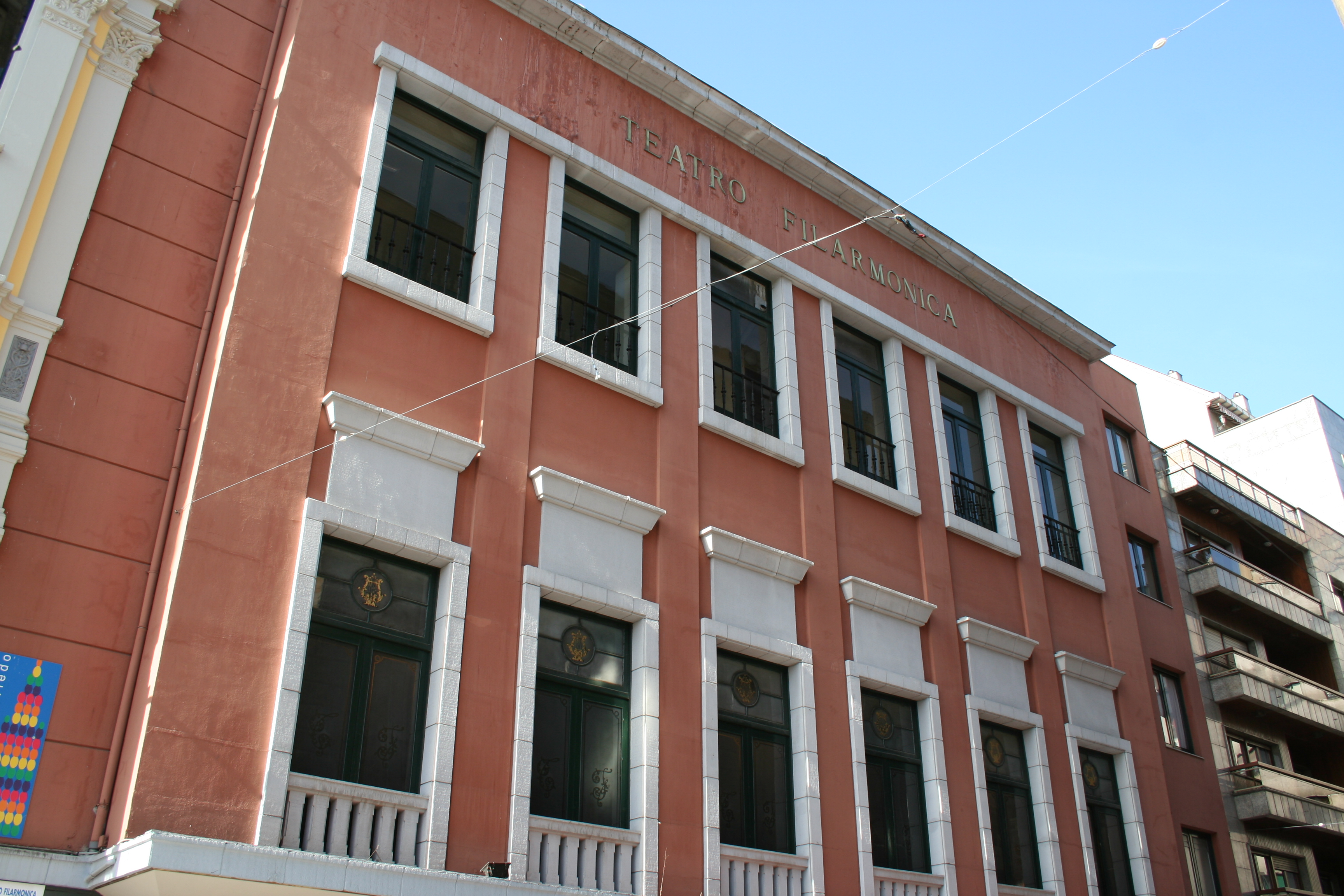 Fachada pricipal del teatro Filarmónica de Oviedo